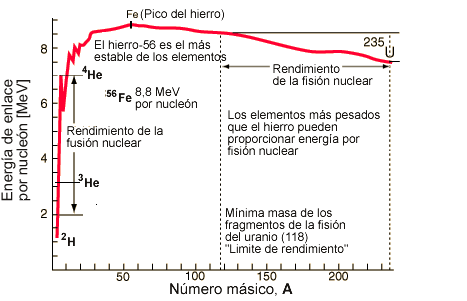 Energía por nucleón (Imagen propia)